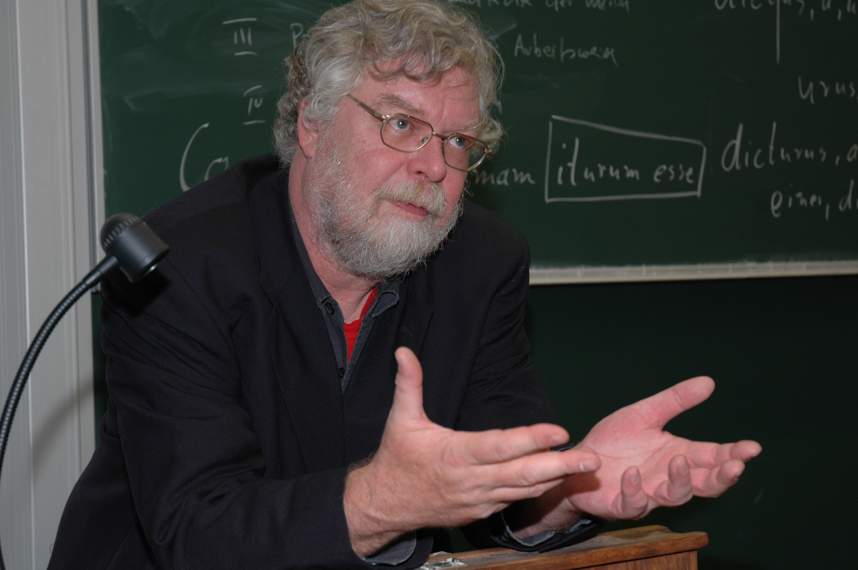 Der Israel-Korrespondent Ulrich W. Sahm am 15. Januar 2009 in Heidelberg